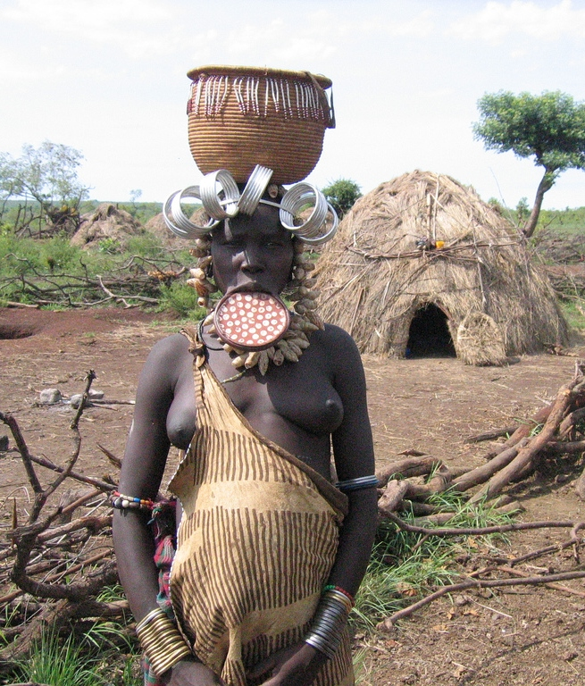 Mursi Tribe